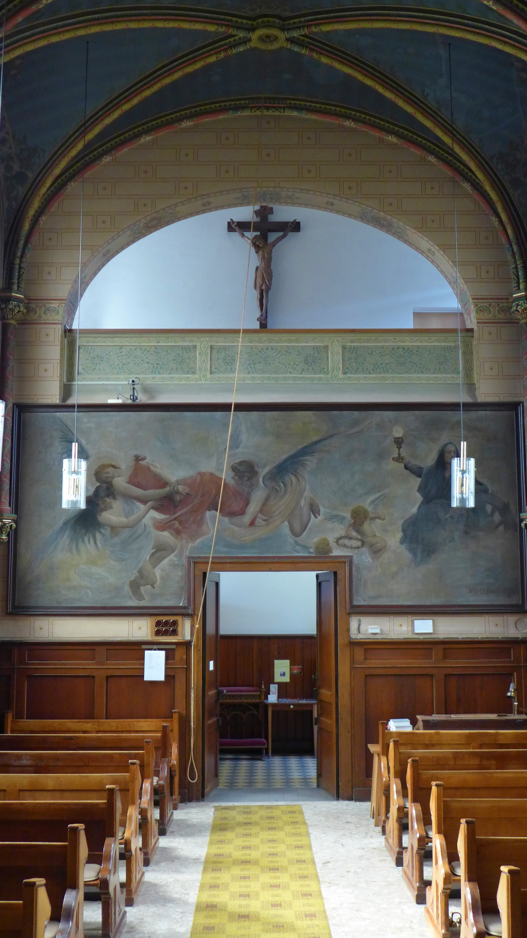 Wallerfangen, Hospitalkirche St. Nikolaus, Ölgemälde mit dem Martyrium der hl. Katharina von M. Villeroy (1887/1888)